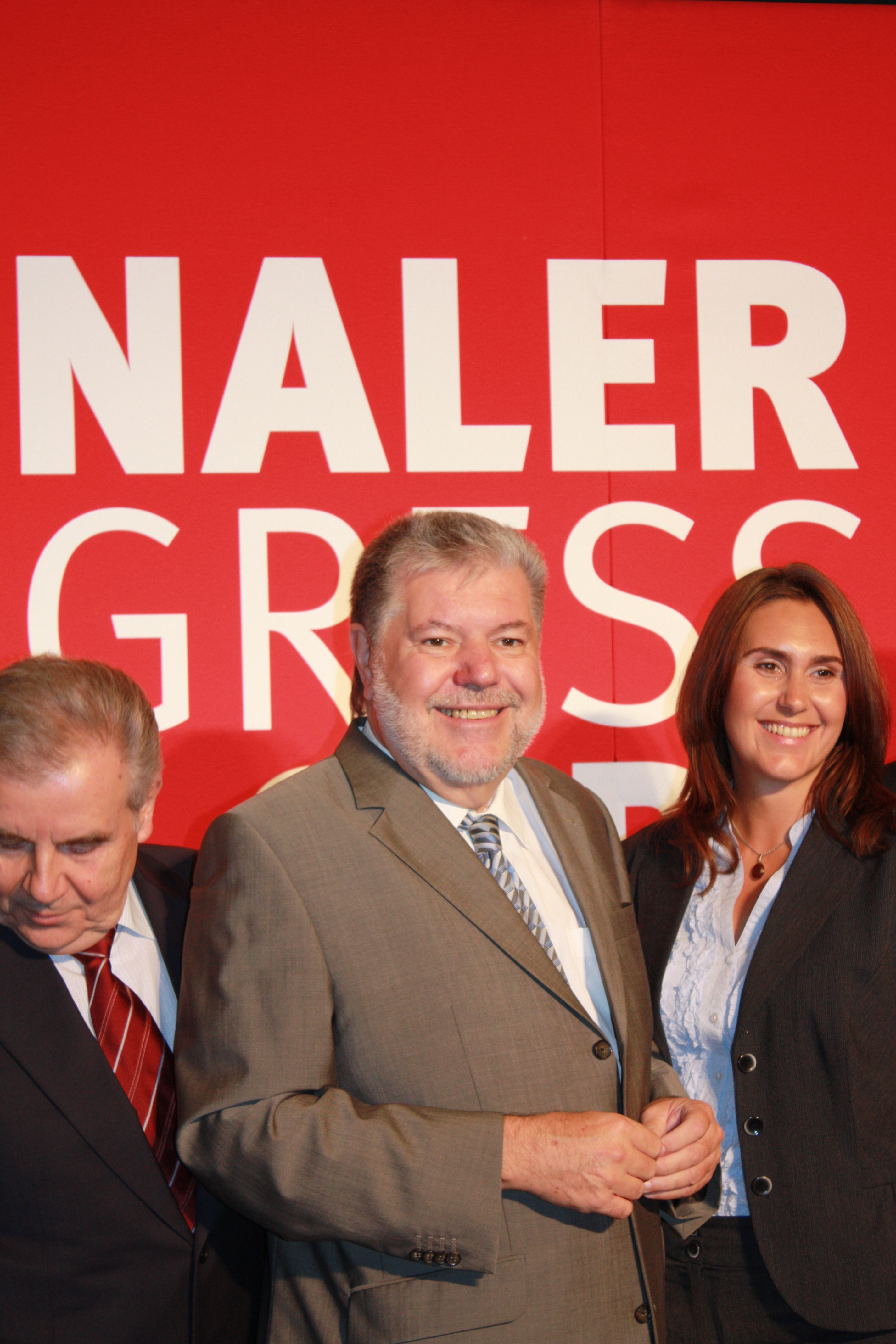 Internationaler Medienkongress im Rahmen der Internationale Funkausstellung 2012, Kurt Beck